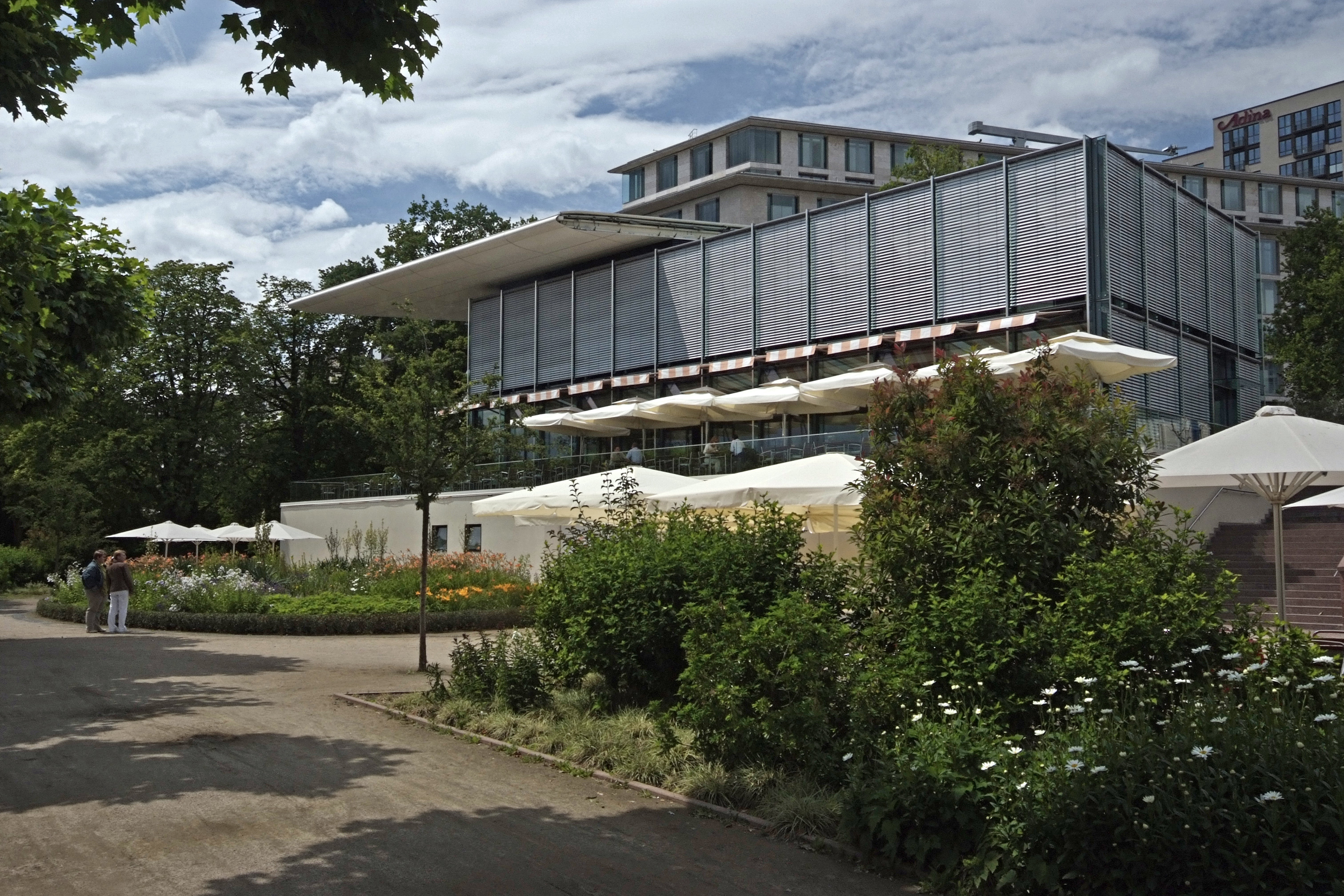 Nizza-Anlage am Mainufer in Frankfurt am Main